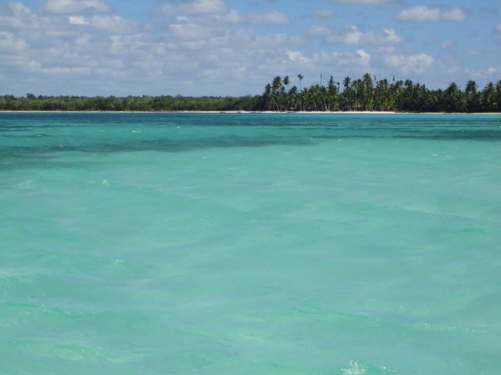 L'isola di Saona, Repubblica Dominicana, fotografata dalla barca